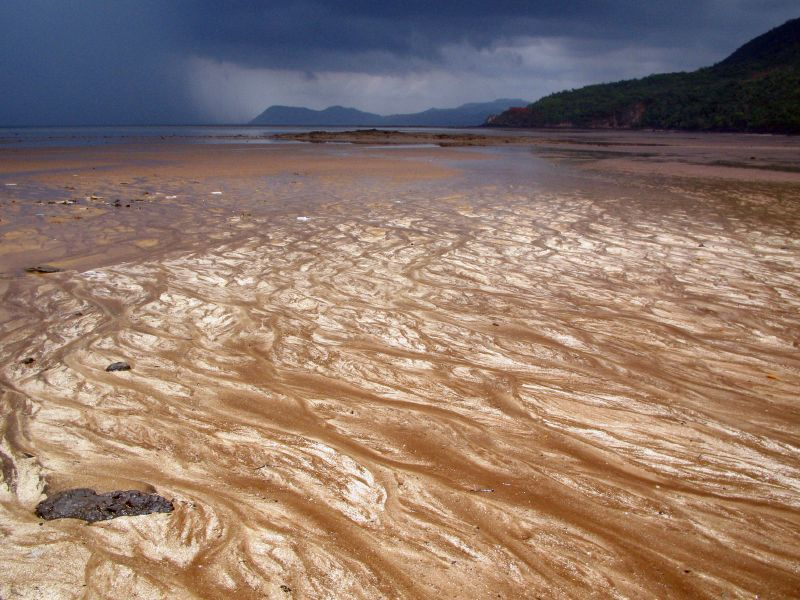 Grain tropical sur la plage de Sohoa, à Mayotte.